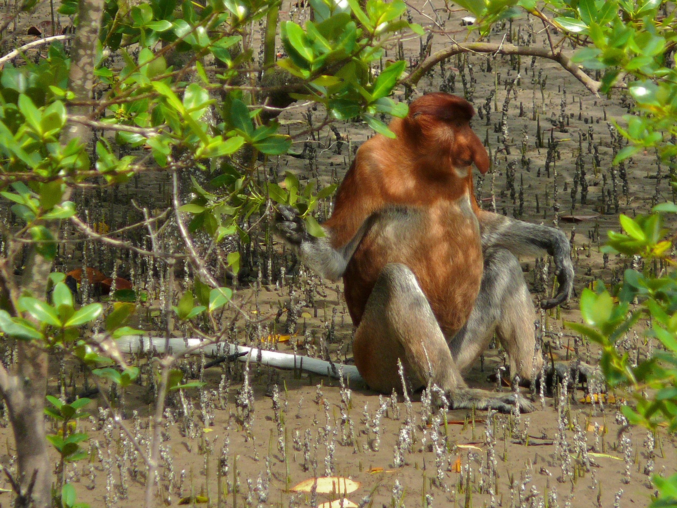 Bako NP, Sarawak, MALAYSIA